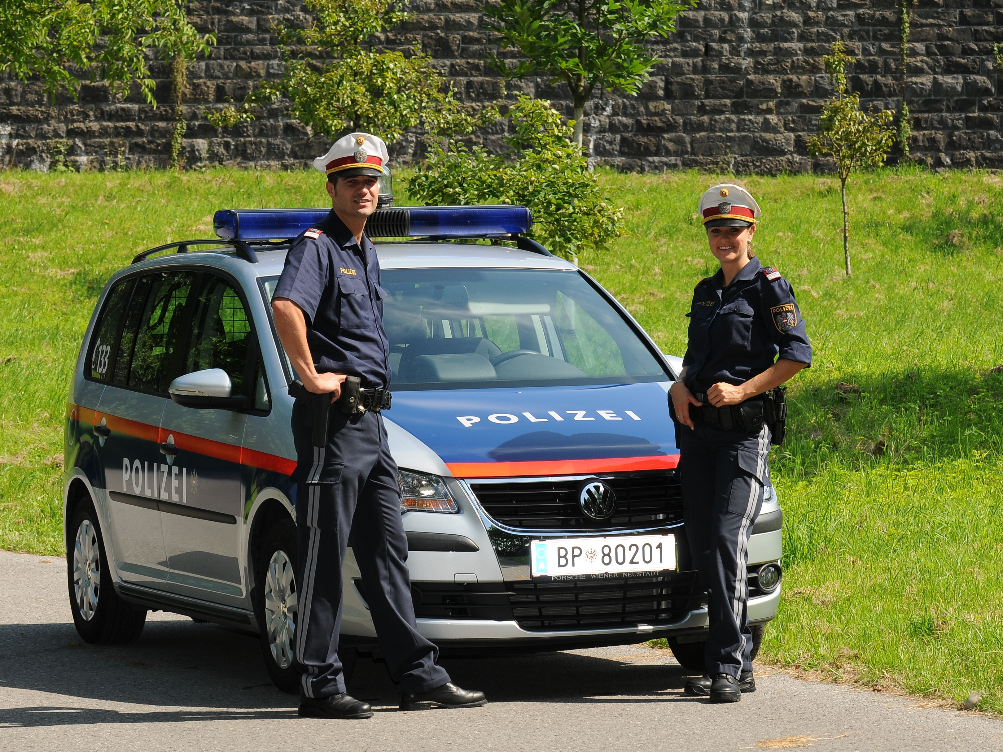 Zwei Beamte der österreichischen Bundespolizei in Dienstuniform und mit Streifenkraftfahrzeug.